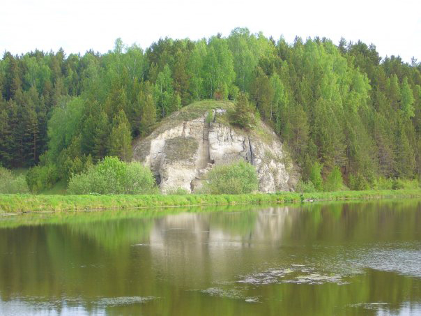 Каравай-гора возле села Суда